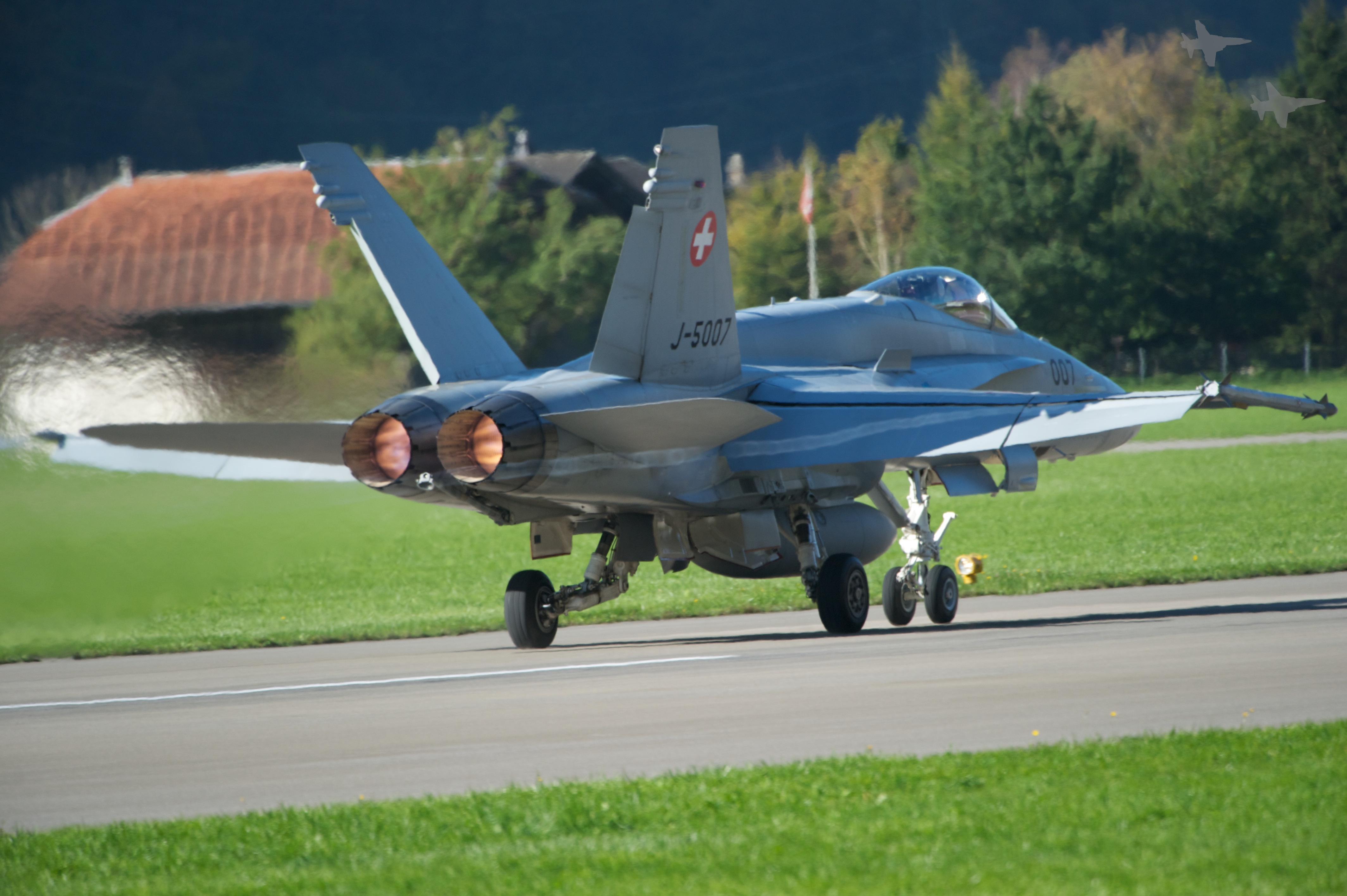 Axalp 2011